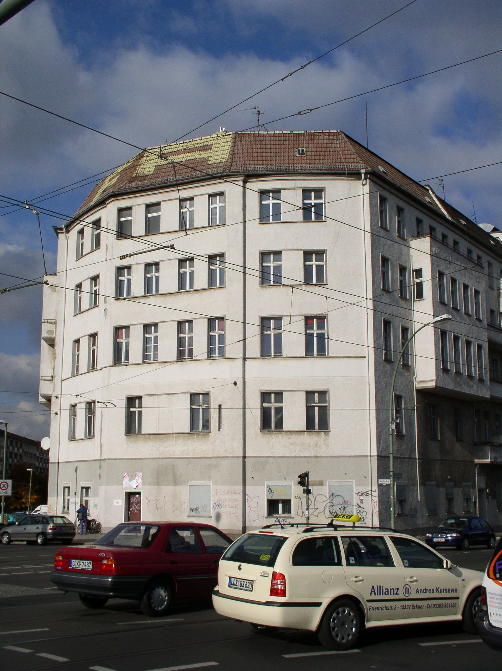 Eckhaus (2005, vor der Sanierung) Warschauer Straße / Marchlewskistraße in Berlin-Friedrichshain